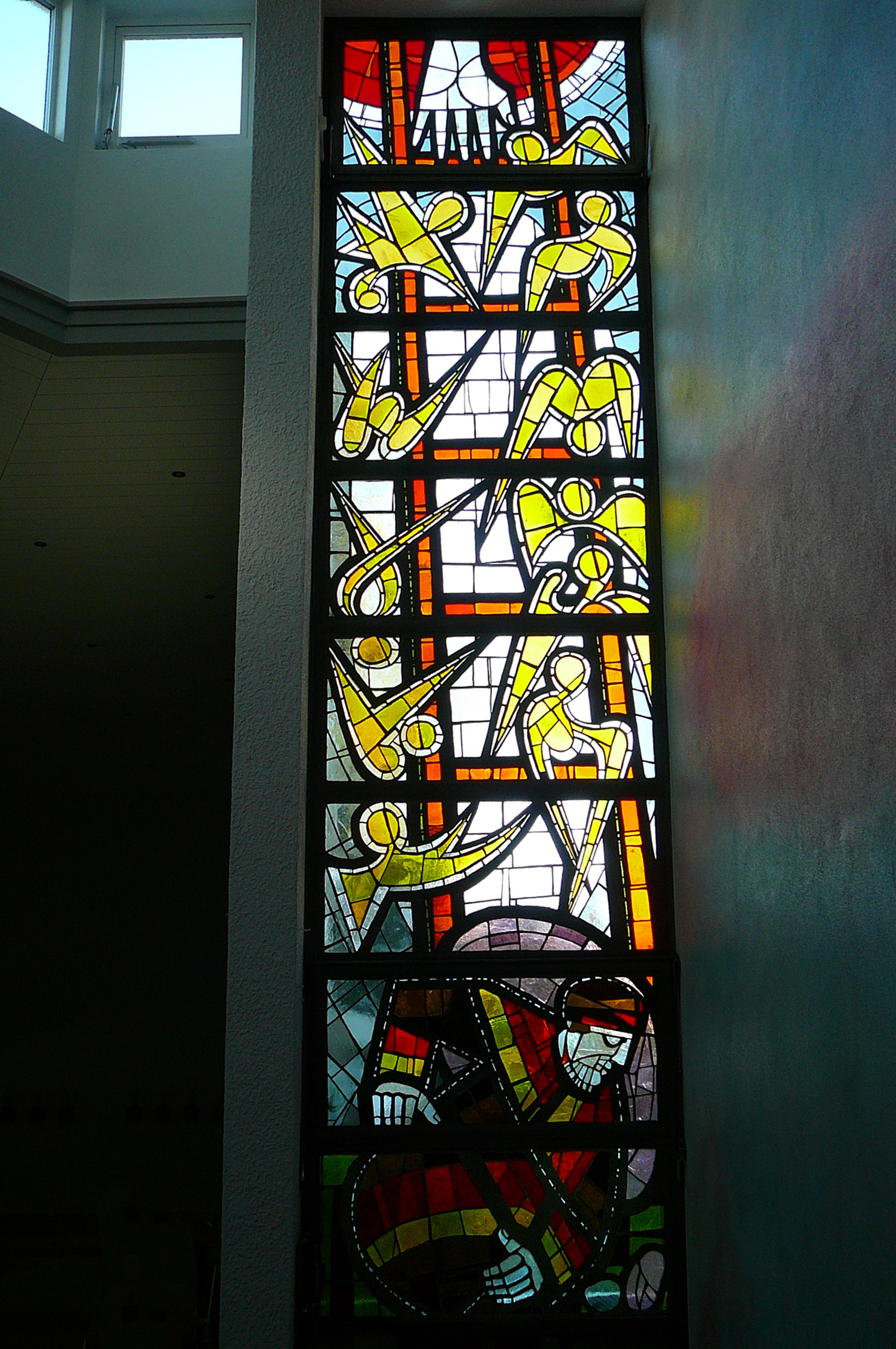 Römisch-katholische Pfarrkirche Bruder Klaus Urdorf, Glasfenster von Peter (Pierino) Travaglini